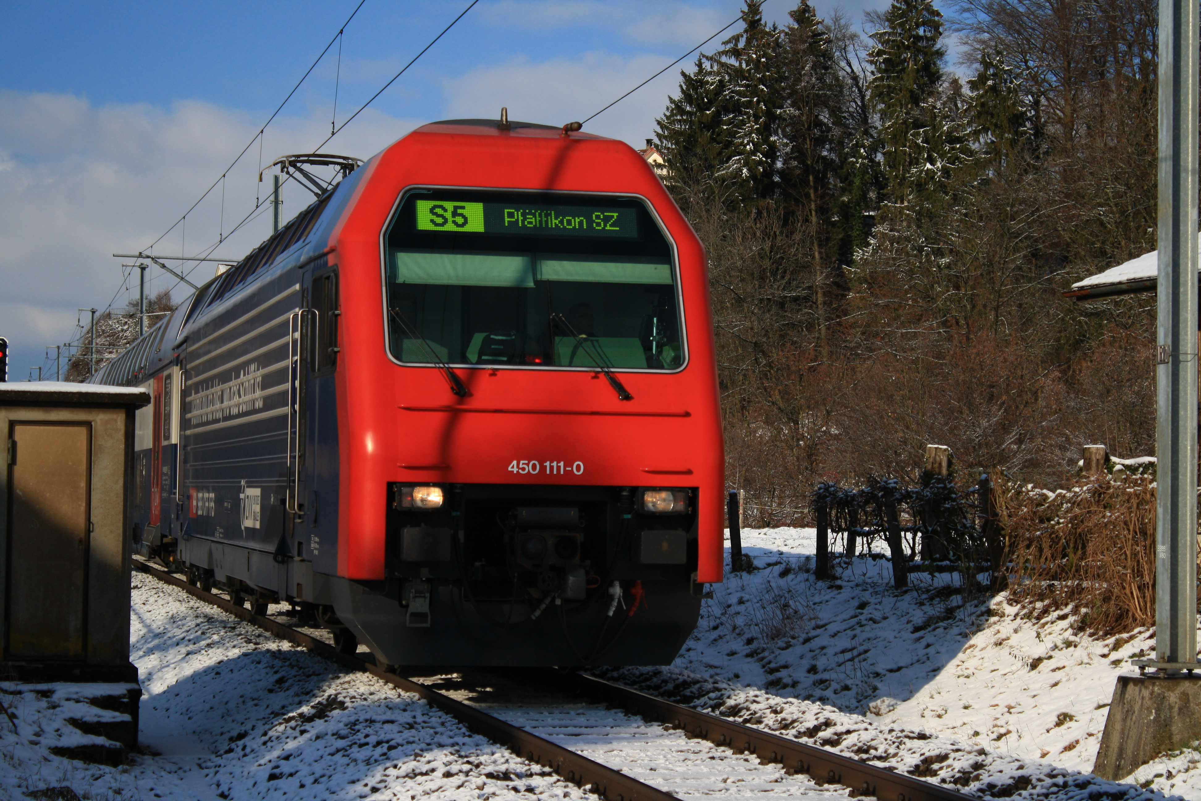 S-Bahn Zürich S5 line in Rüti (Switzerland) towards Rapperswil (SG), Trümmlenweg in the background